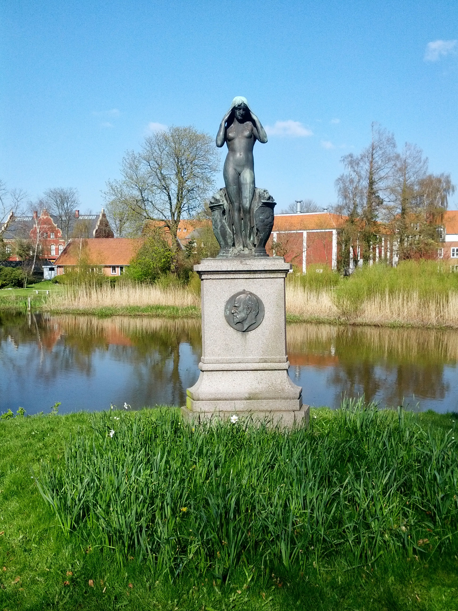 Monument for Emil Chr. Hansen (1842 - 1909), som grundlagde den moderne rendyrkning af gær.